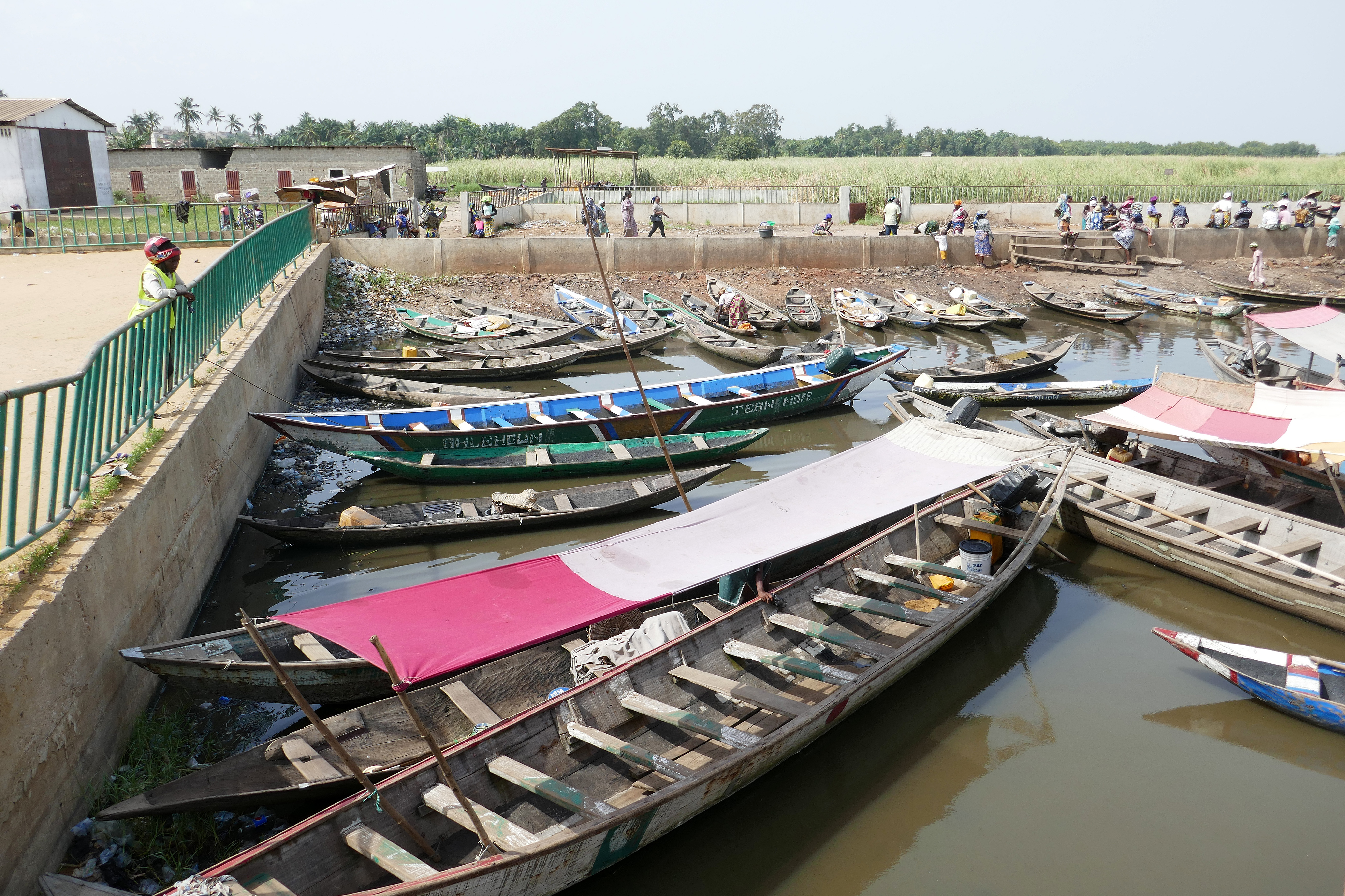 Embarcadère pour Ganvié à Abomey-Calavi (Bénin).